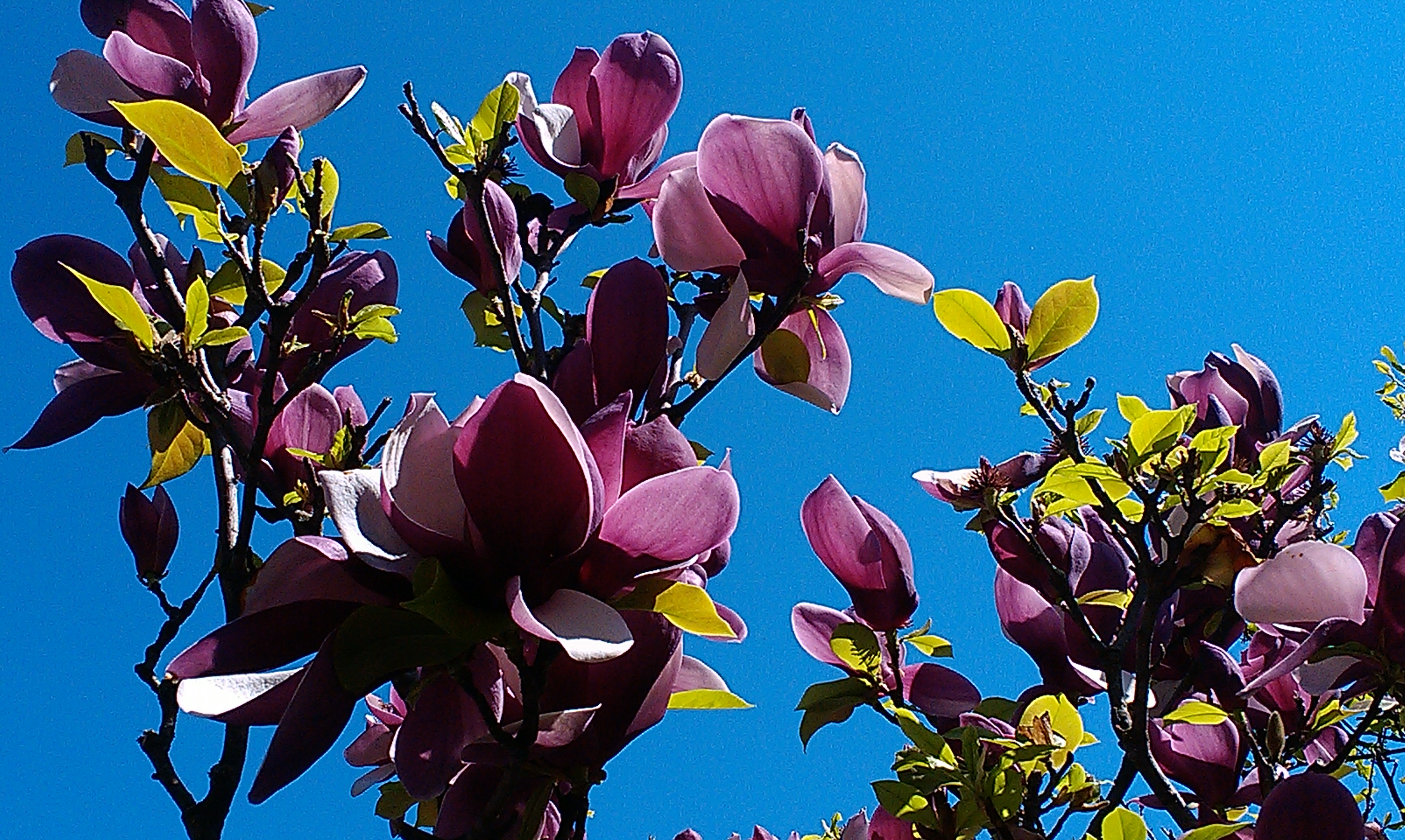 Магнолії у ботсаду ім.Гришка у м.Києві. Травень 2013р.